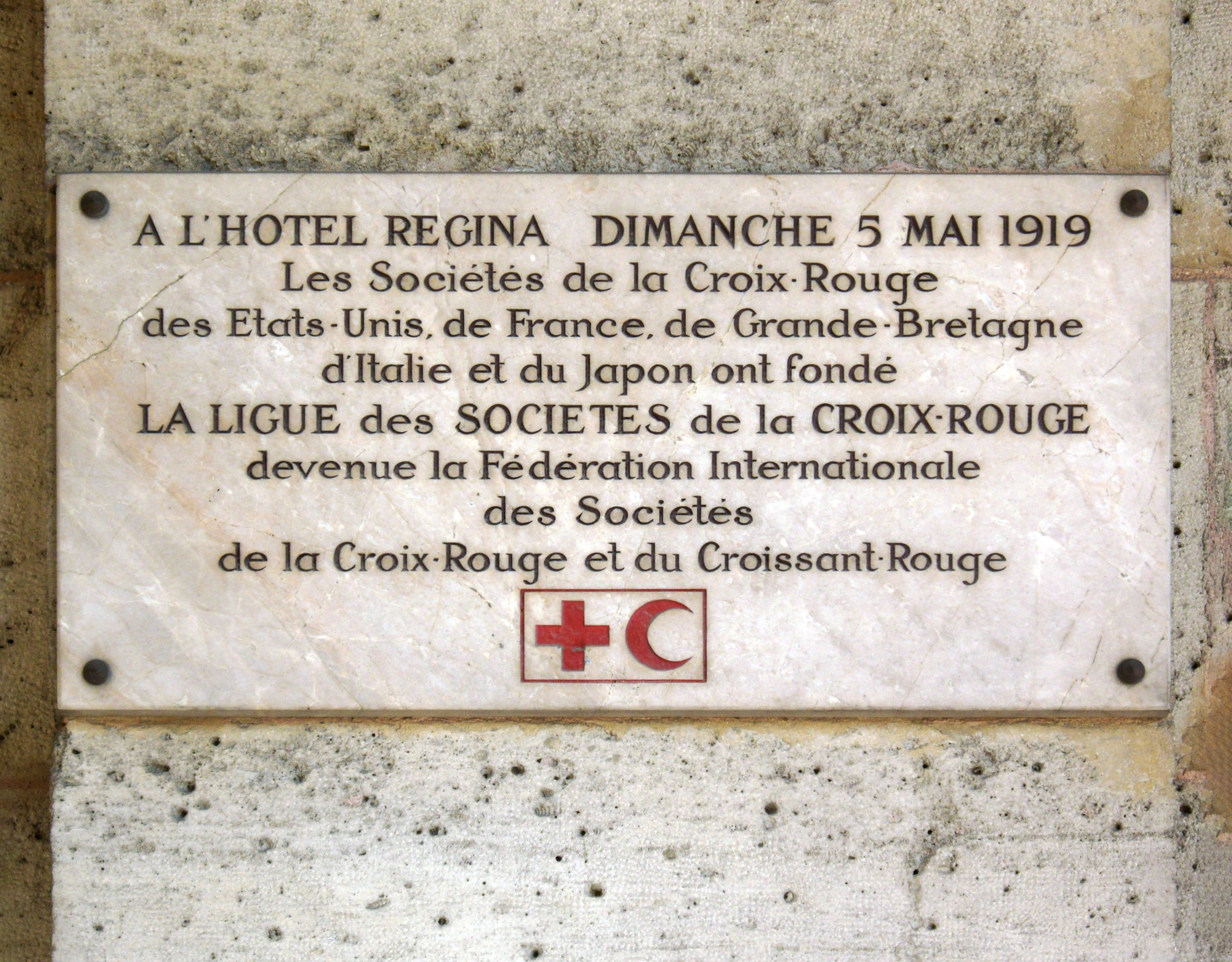 Plaque apposée sur la façade de l'hôtel Régina au n° 2 de la place des Pyramides, Paris 1er.« À l'hôtel Régina, dimanche 5 mai 1919, les Sociétés de la Croix-Rouge des États-Unis, de France, de Grande-Bretagne, d'Italie et du Japon ont fondé la Ligue des Sociétés de la Croix-Rouge devenue la Fédération internationale des Sociétés de la Croix-Rouge et du Croissant-Rouge. »